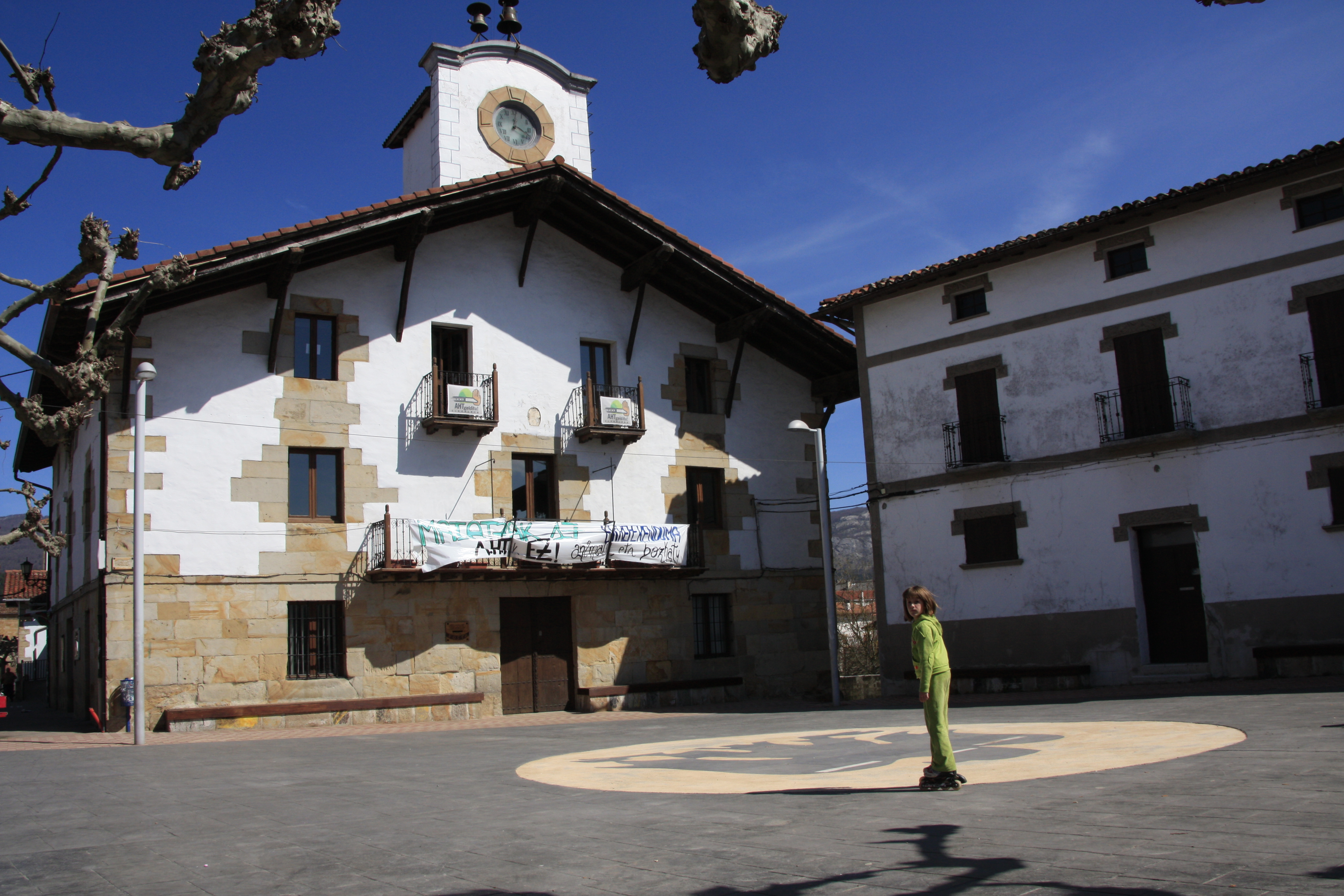 Arbizuko Udaletxea